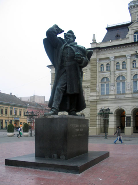 Споменик Светозару Милетићу